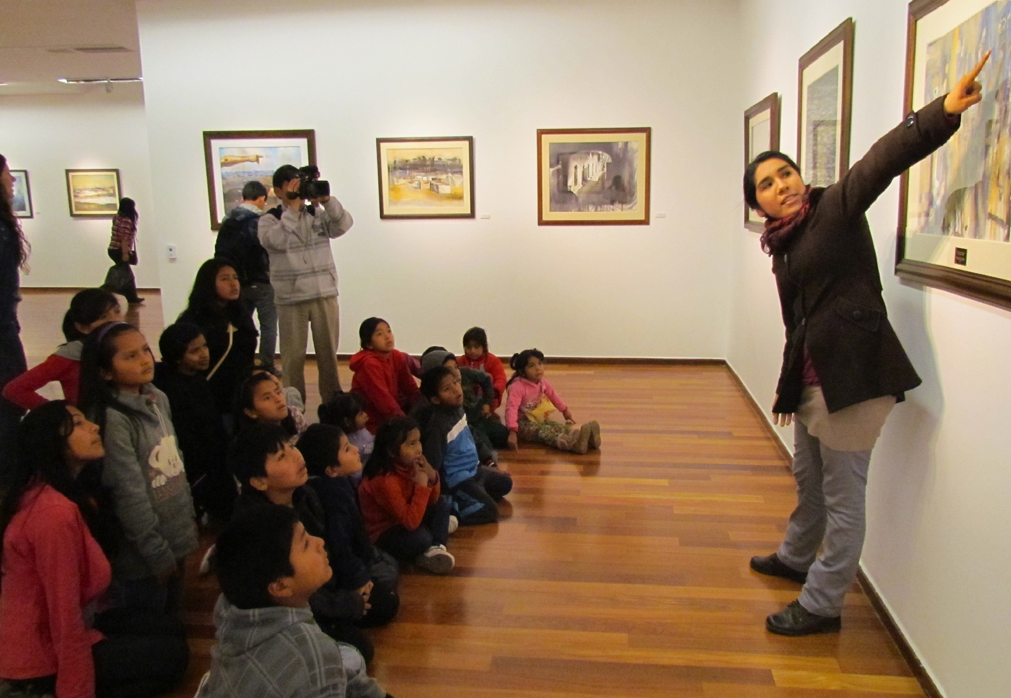 Mg. Diana Alvarado García (historiadora del arte y gestora cultural) explicando el contenido y significado de una muestra de pinturas a estudiantes de primaria en la Galería de Arte "John Harriman", de la Asociación Cultural Peruano Británica: Centro Cultural Británico de Miraflores (Lima, Perú).